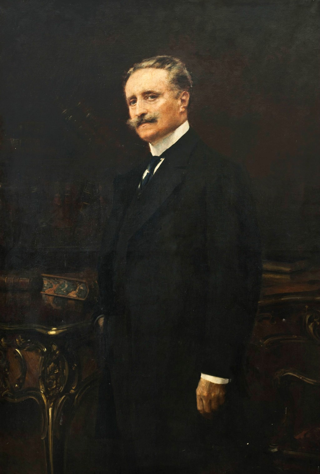 Paul Deschanel (1855-1922), président de la République française.